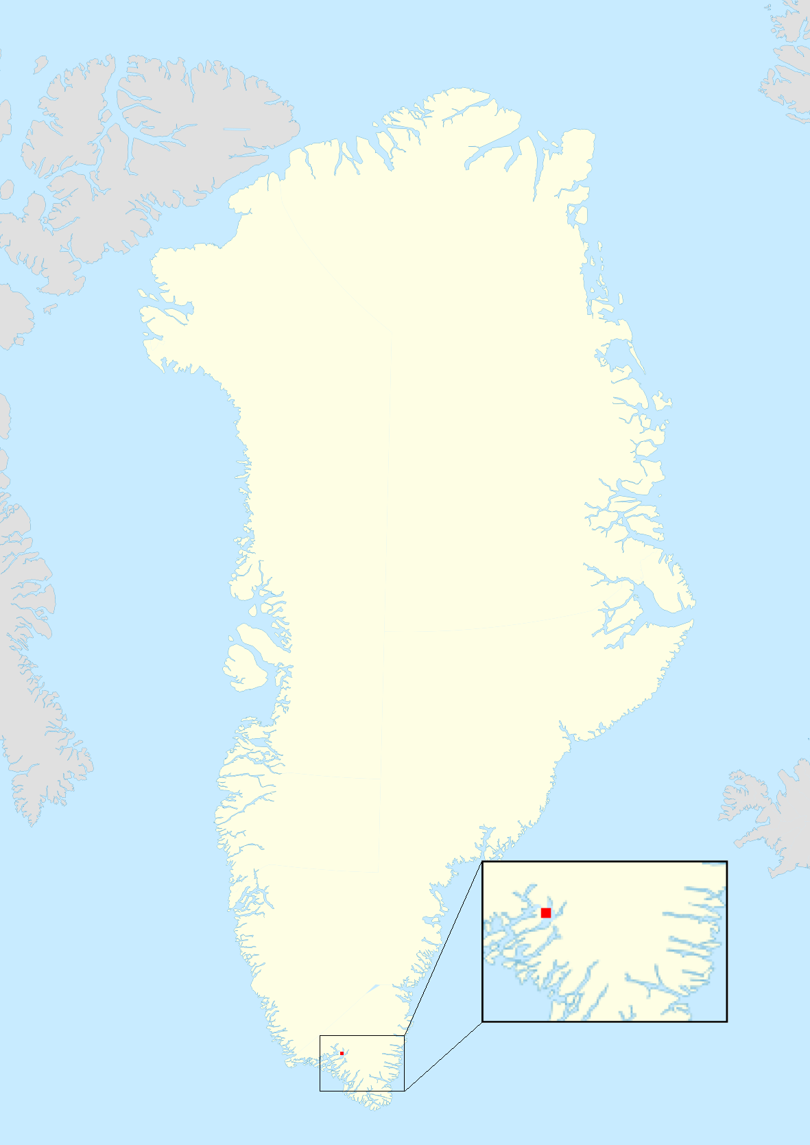 Carte indiquant Gard(h)ar, ancien comptoir Viking au Groenland. Carte créée à partir de Greenland edcp location map.svg .